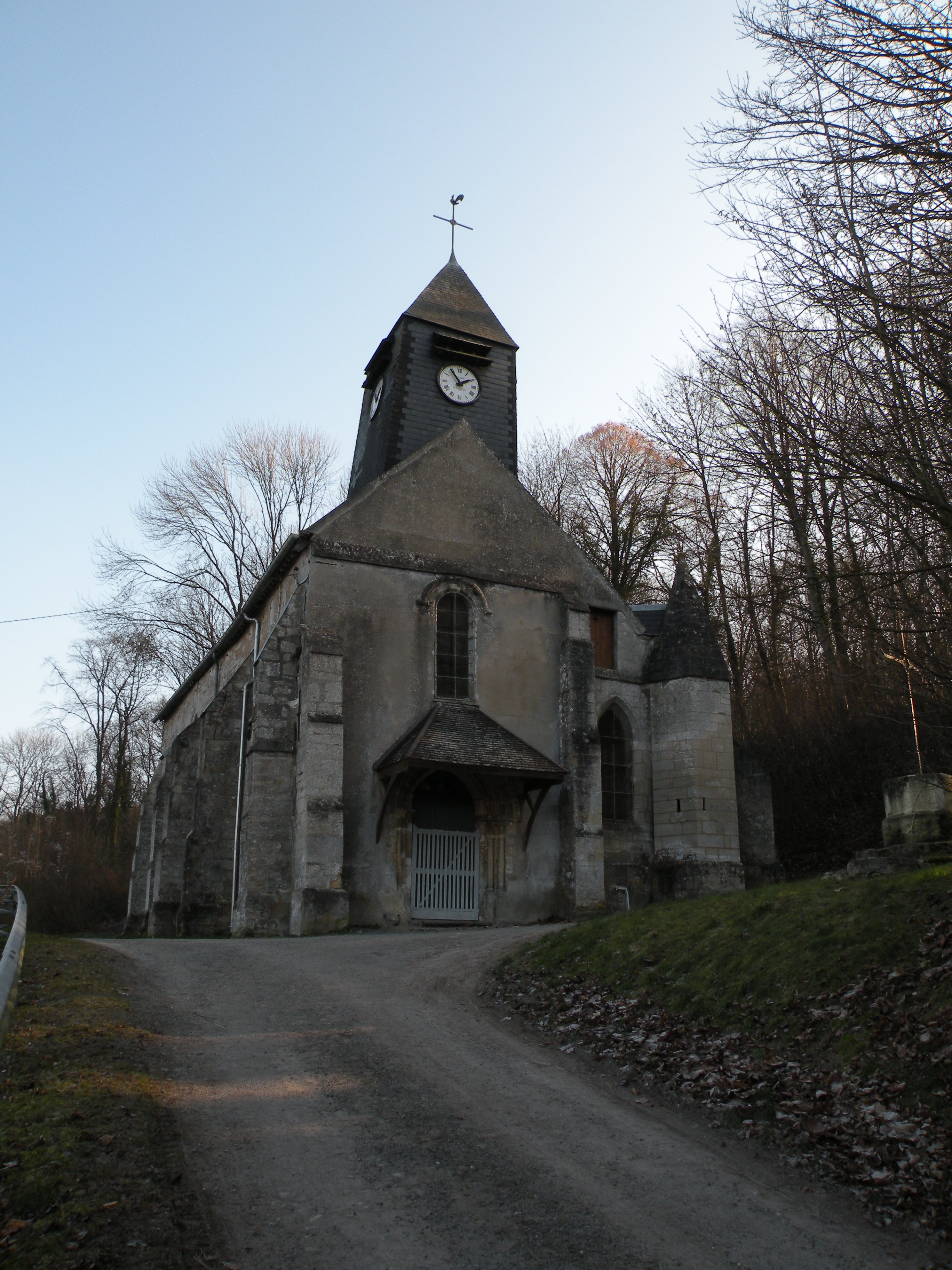 eglise de la commune de dieudonné, oise